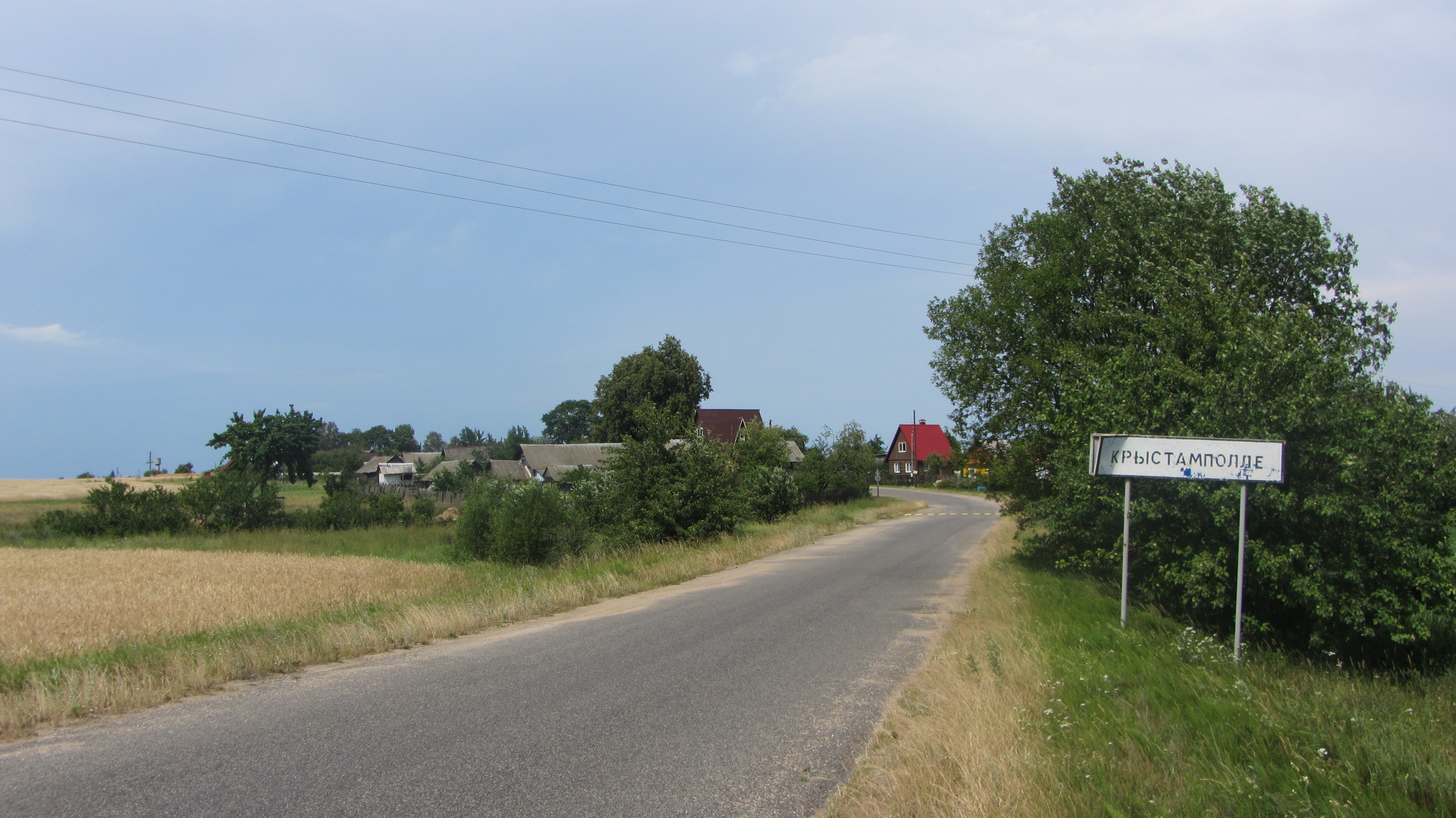 Вёска Крыстампалле, Пухавіцкі раён.